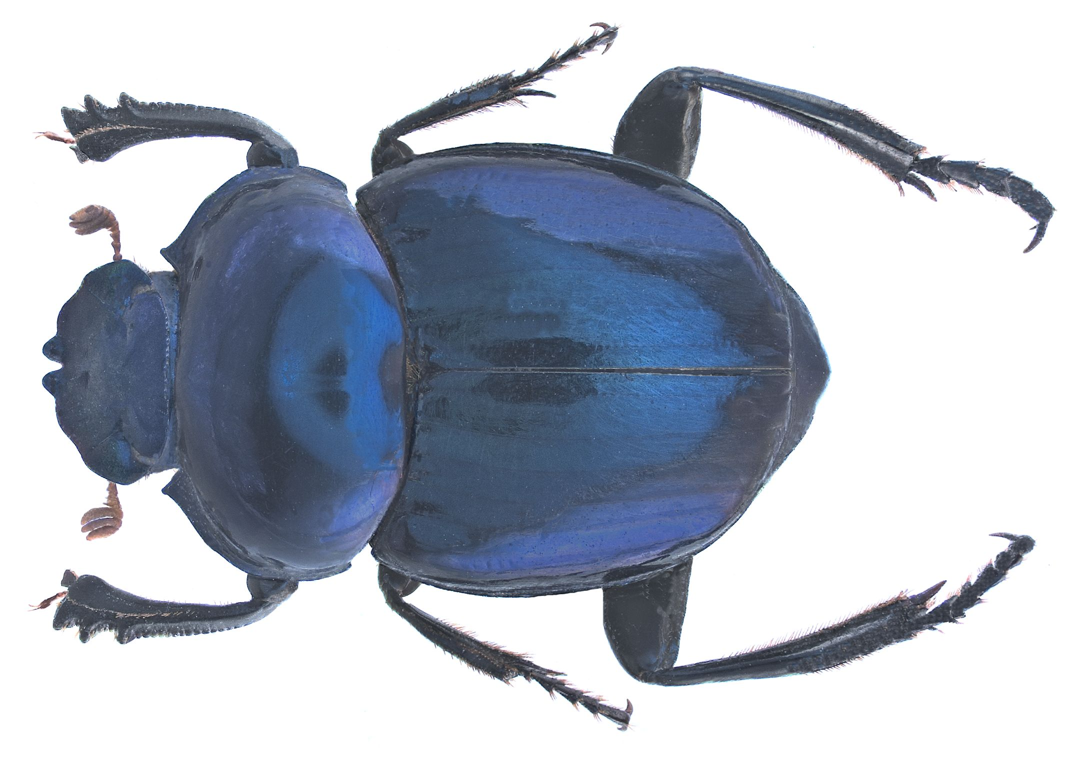 Familie: Scarabaeidae Grösse: 14 mm Verbreitung: Argentinien, Brasilien Fundort: Brasilien, Iguazu leg. H.P.Marx, 1983; det. Sil Falqueto Foto: U.Schmidt, 2006